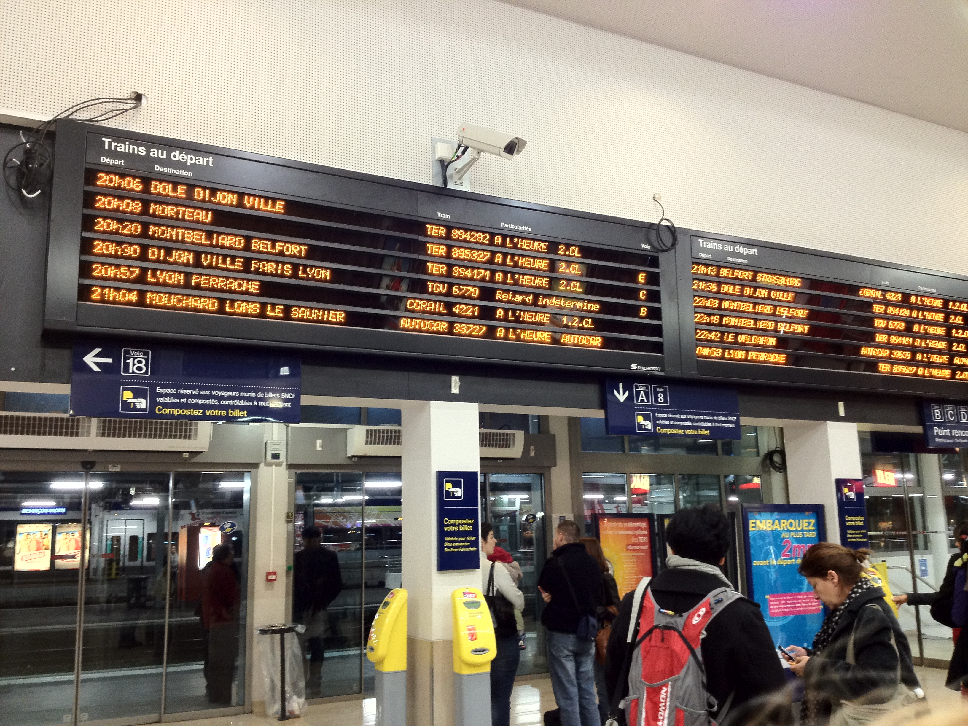 Le panneau d'affichage des départs de la gare de Besançon Viotte